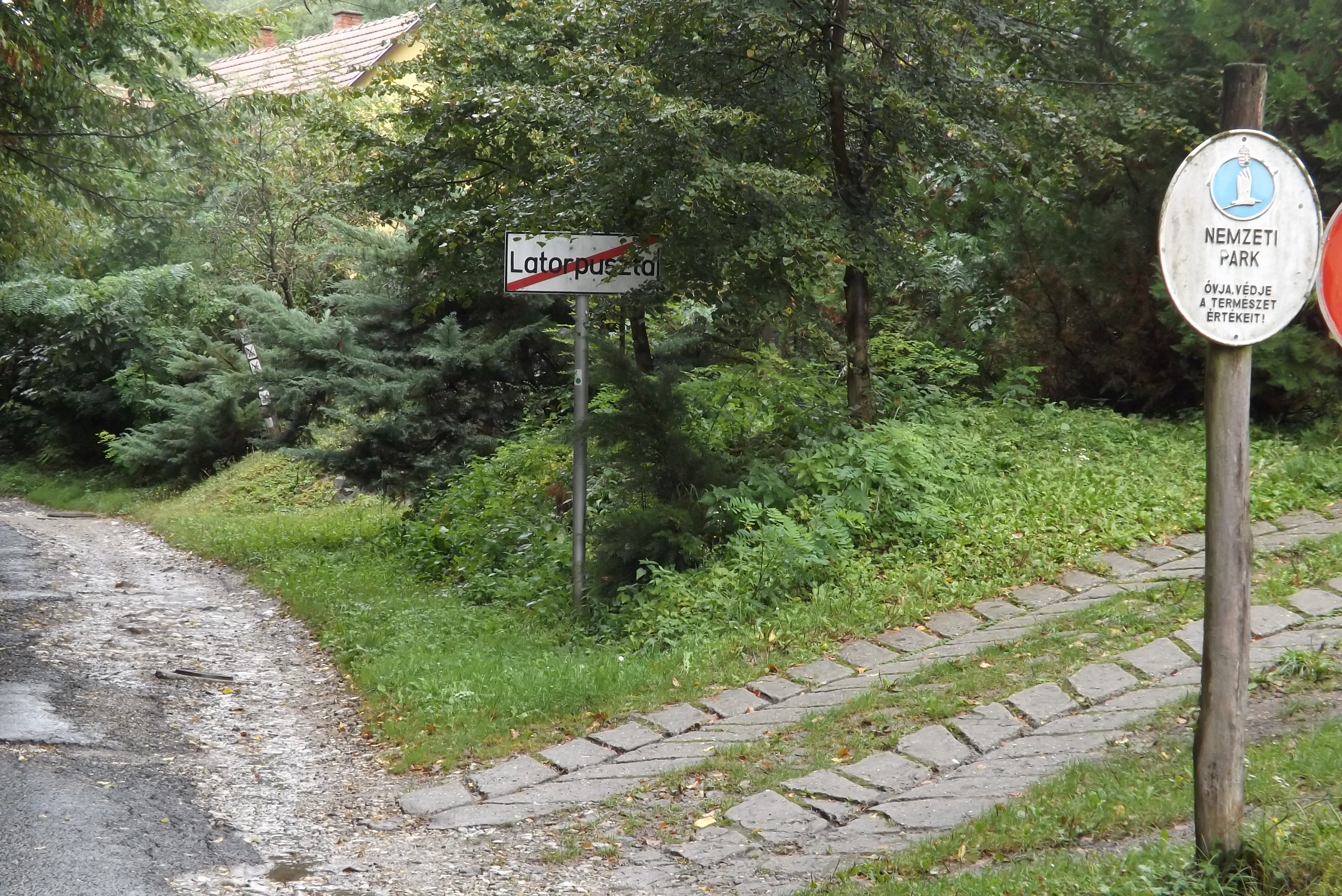 A Latorpusztára vezető út